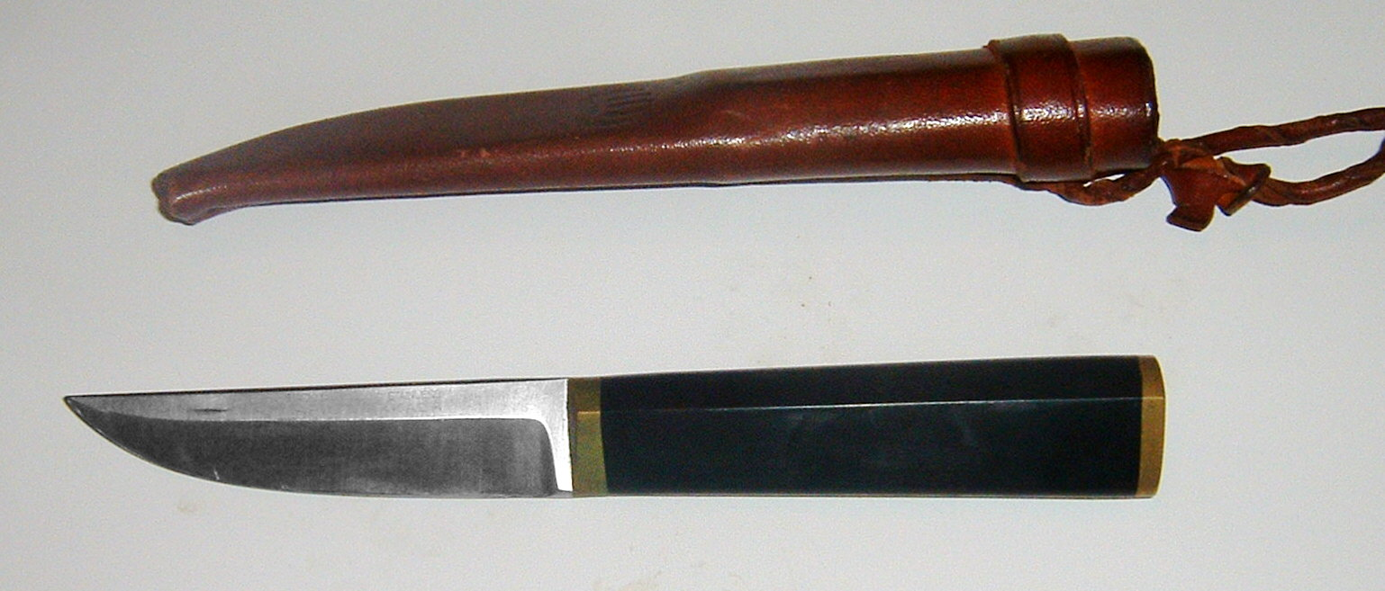 Puukko by Tapio Wirkkala